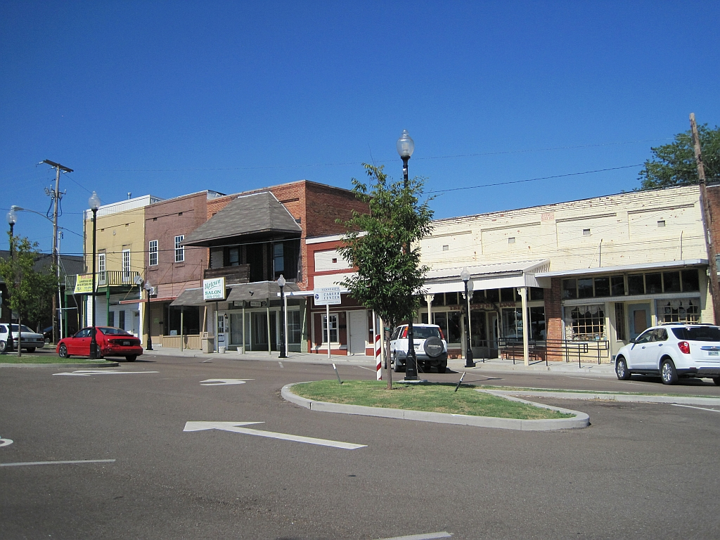 Downtown Camden, Tennessee.